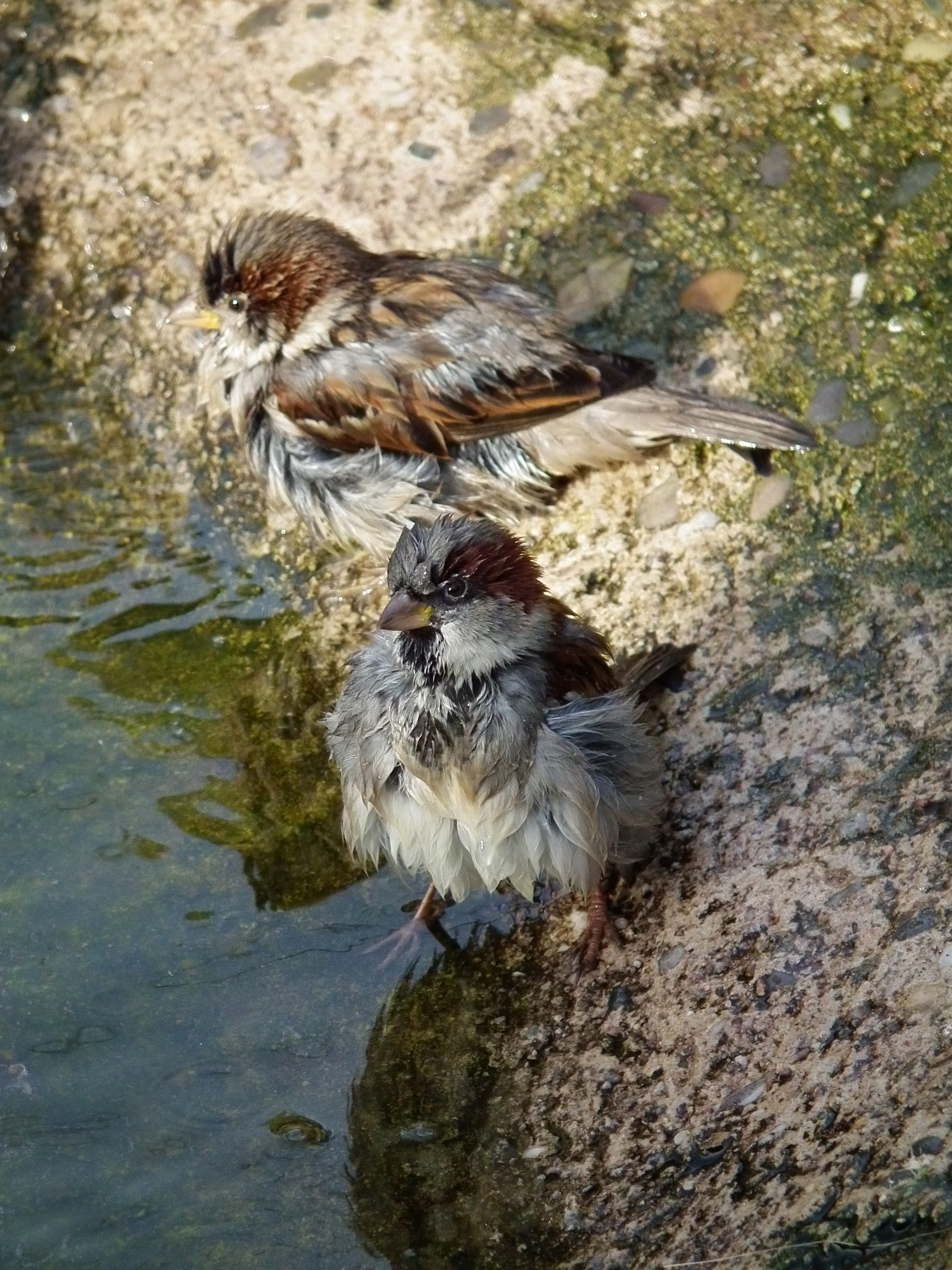 Männliche Spatzen (Passer domesticus) beim Baden, fotografiert in Heidelberg (Baden-Württemberg, Deutschland)